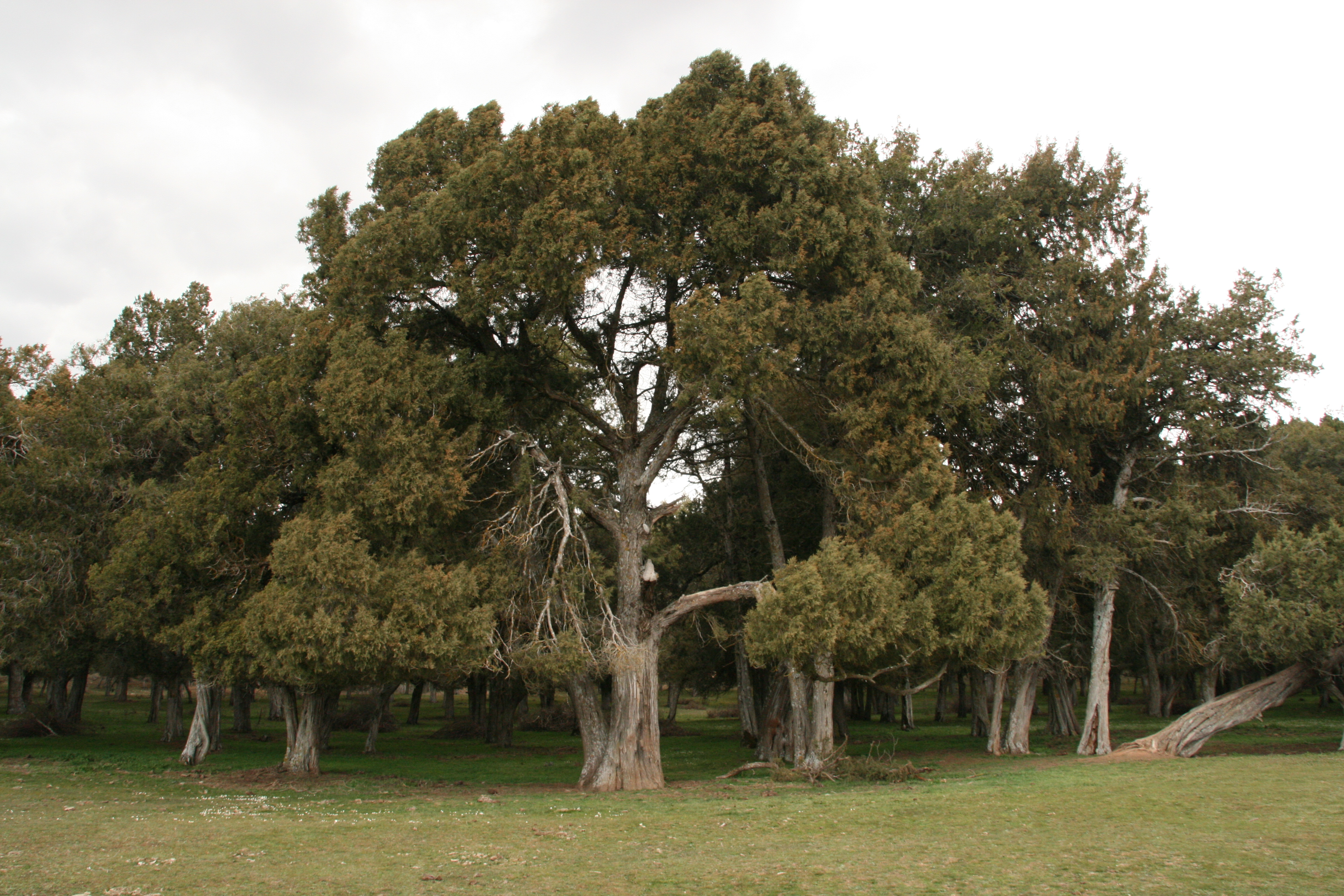 Sabinar de Calatañazor en marzo de 2016